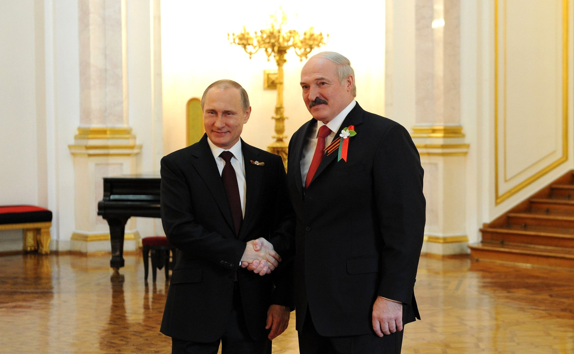 Перед началом неформальной встречи глав государств – участников СНГ. Владимир Путин с Президентом Белоруссии Александром Лукашенко